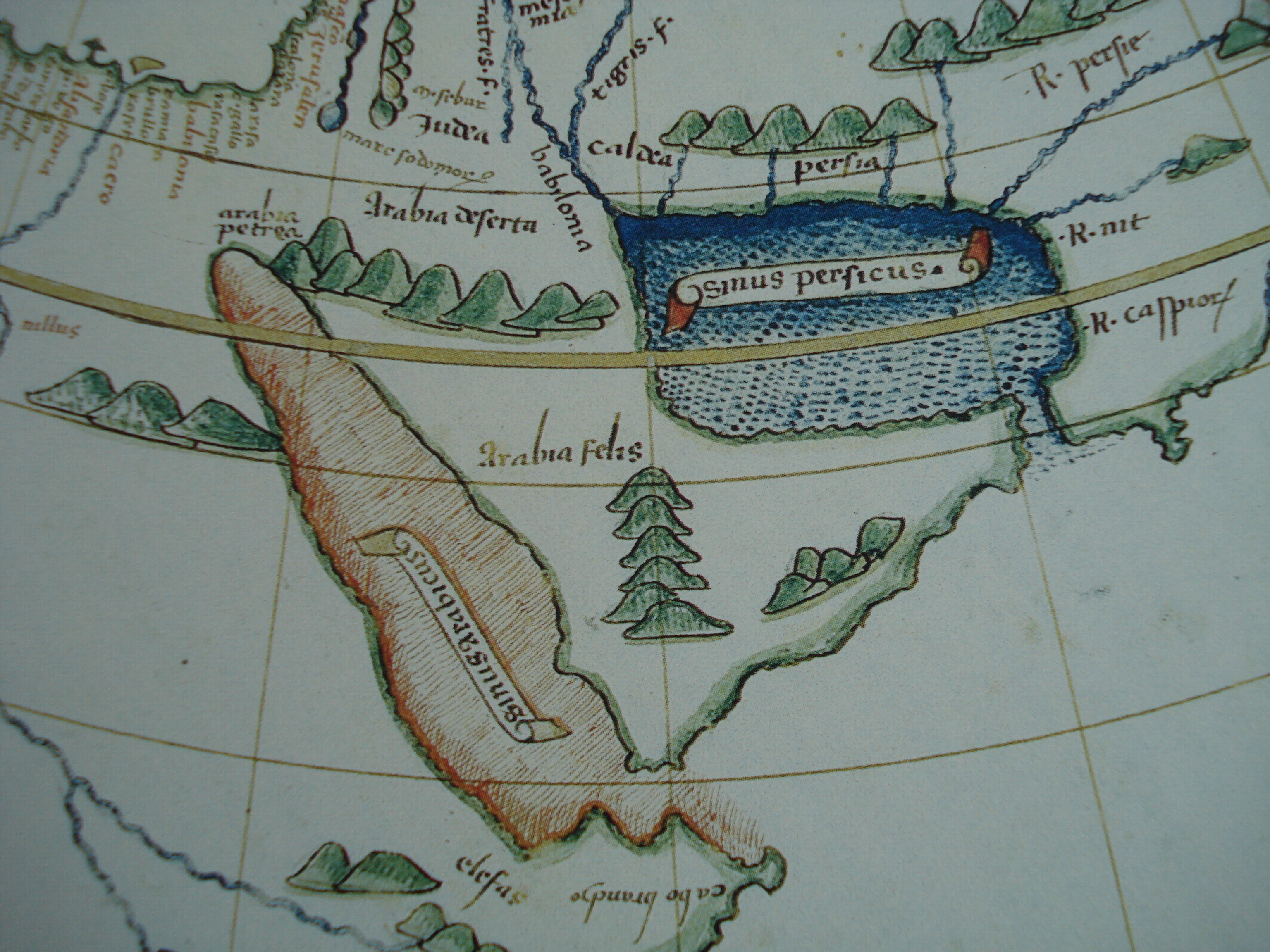 خرائط تاريخية قديمة مصدر: مخازن مكتبة جامعة بريمين تاريخ: خرائط تعود للقرون الرابع عشر إلى أوائل القرن العشرين نوع: تصوير كاميرا رقمي